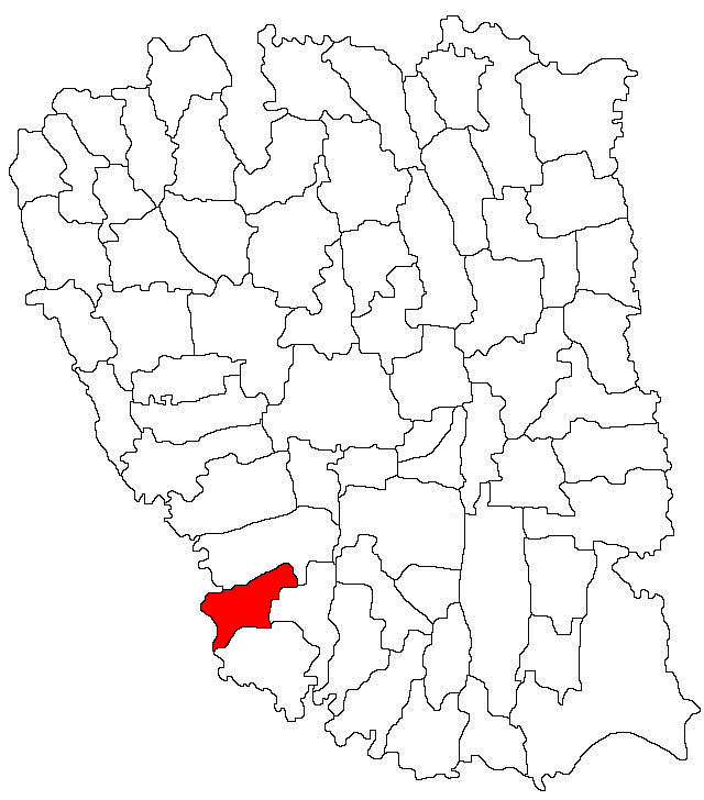 Categorie:Hărţi ale judeţului Galaţi